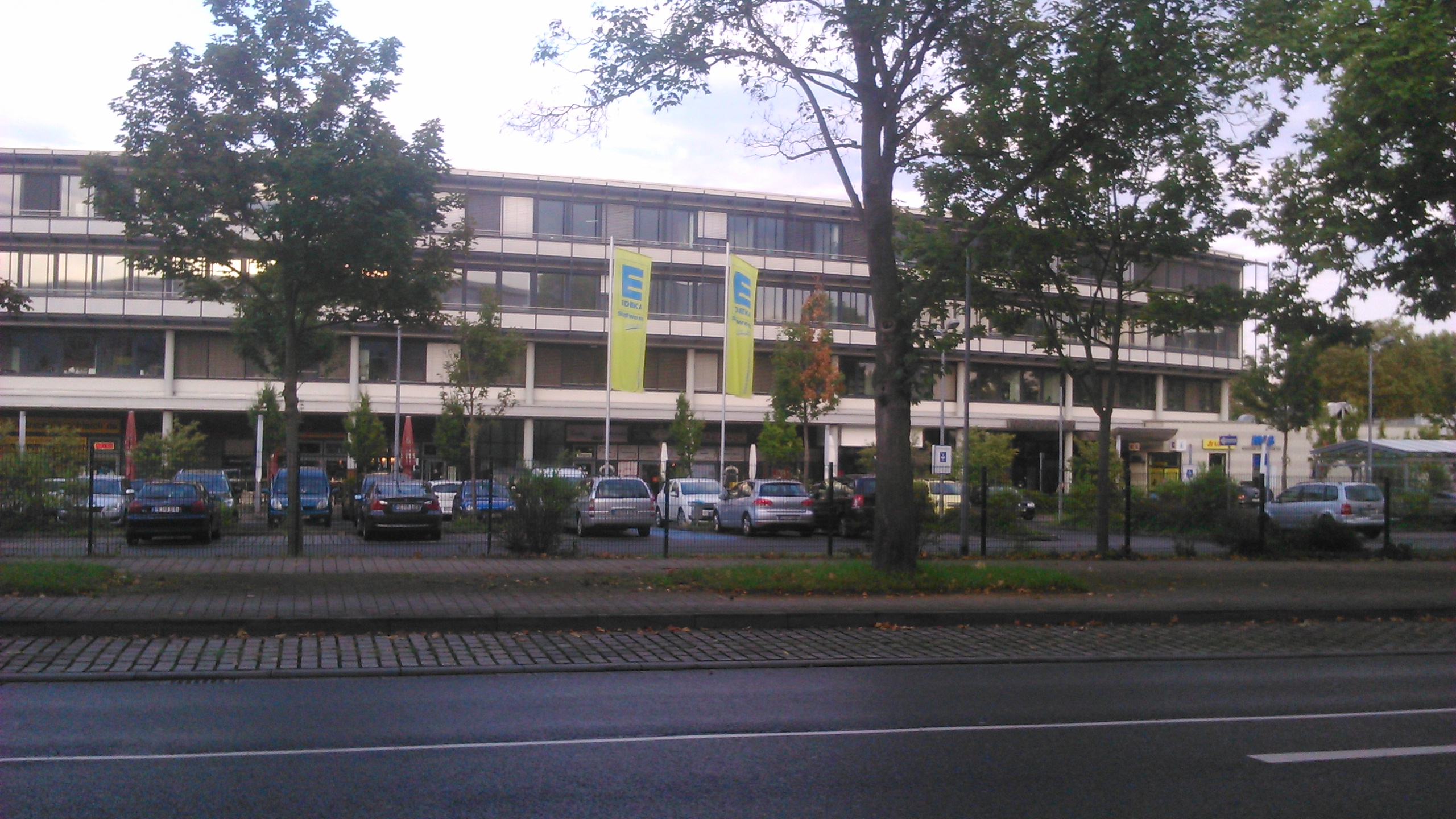 Das Einkaufszentrum King Park Center im Mainzer Stadtteil Hartenberg-Münchfeld, 2017